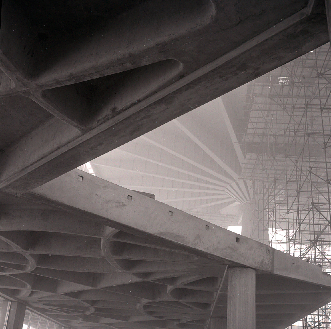 Documentazione dei lavori di costruzione del Palazzo del Lavoro per l'Esposizione internazionale Italia '61. Servizio fotografico : Torino, 1961 / Paolo Monti. - Buste: 33, Fototipi: 33 : Negativo b/n, gelatina bromuro d'argento/ pellicola ; 6x6. - ((Serie costituita da 33 negativi identificati con i nn.: 20622-20654. Sulla busta R20622 manoscritto: "E.I.L. - TO". La suddetta serie è contenuta nella scatola identificata con la numerazione R20420/20798. Sulla scatola manoscritto a pennarello nero: "Architettura/ e design". - Occasione: Documentazione dell'esposizione internazionale Italia '61 tenutasi a Torino in occasione del centenario dell'unità d'Italia